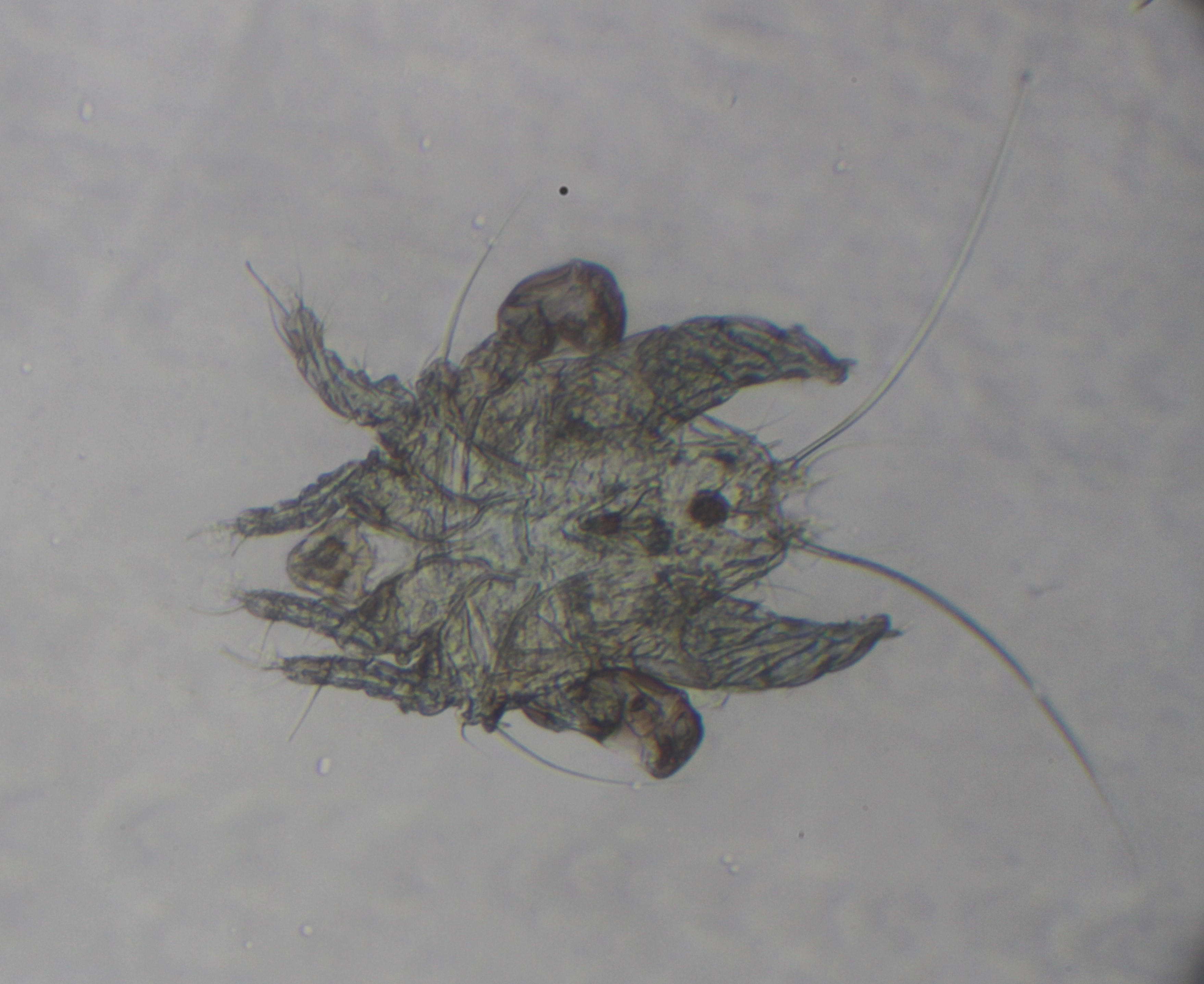 самець мишачого кліща, знімок надано Spoluka Lab.